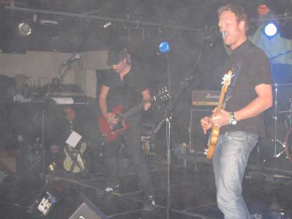 Pulverhund